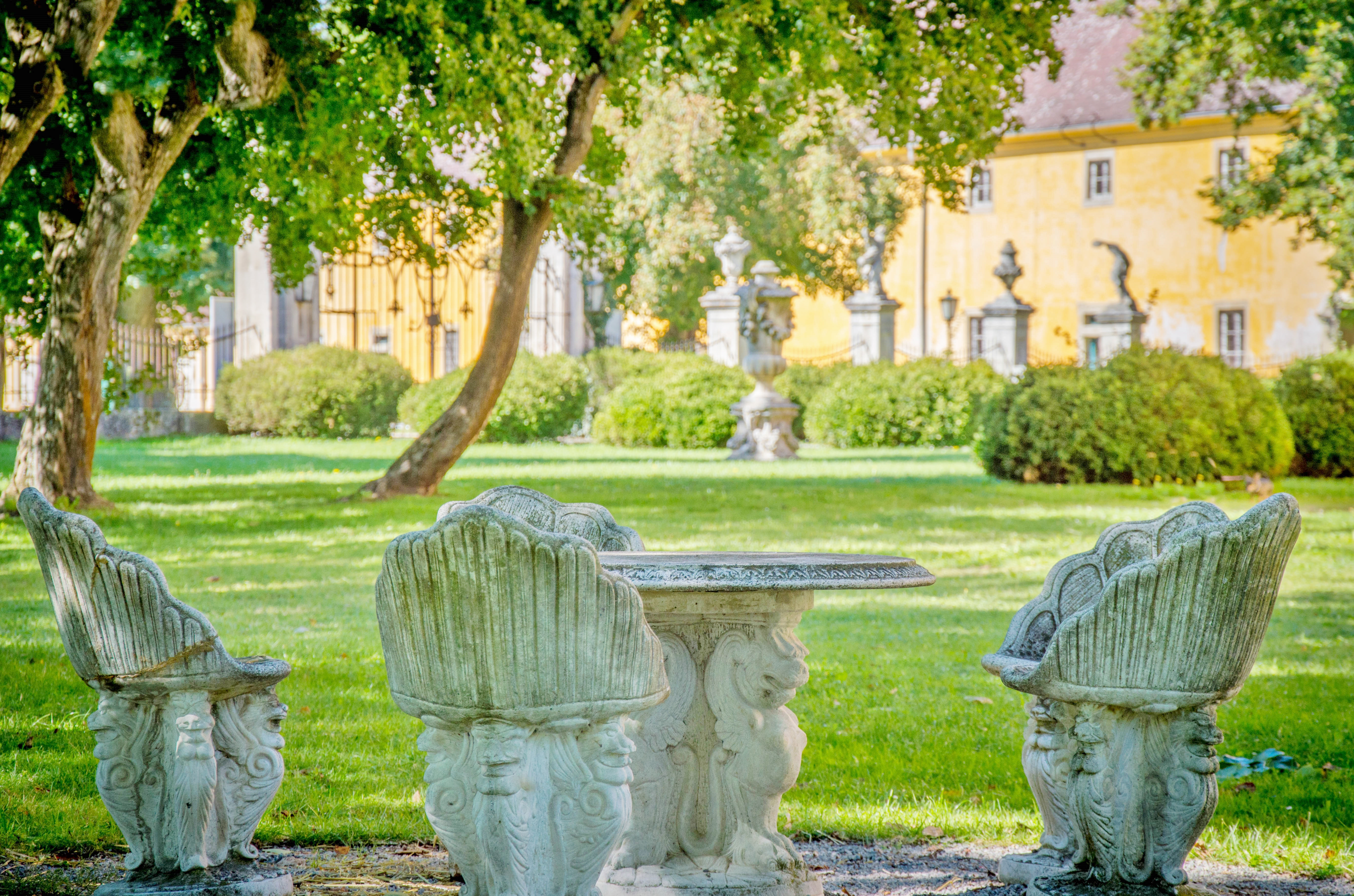 Schlosspark Marchegg